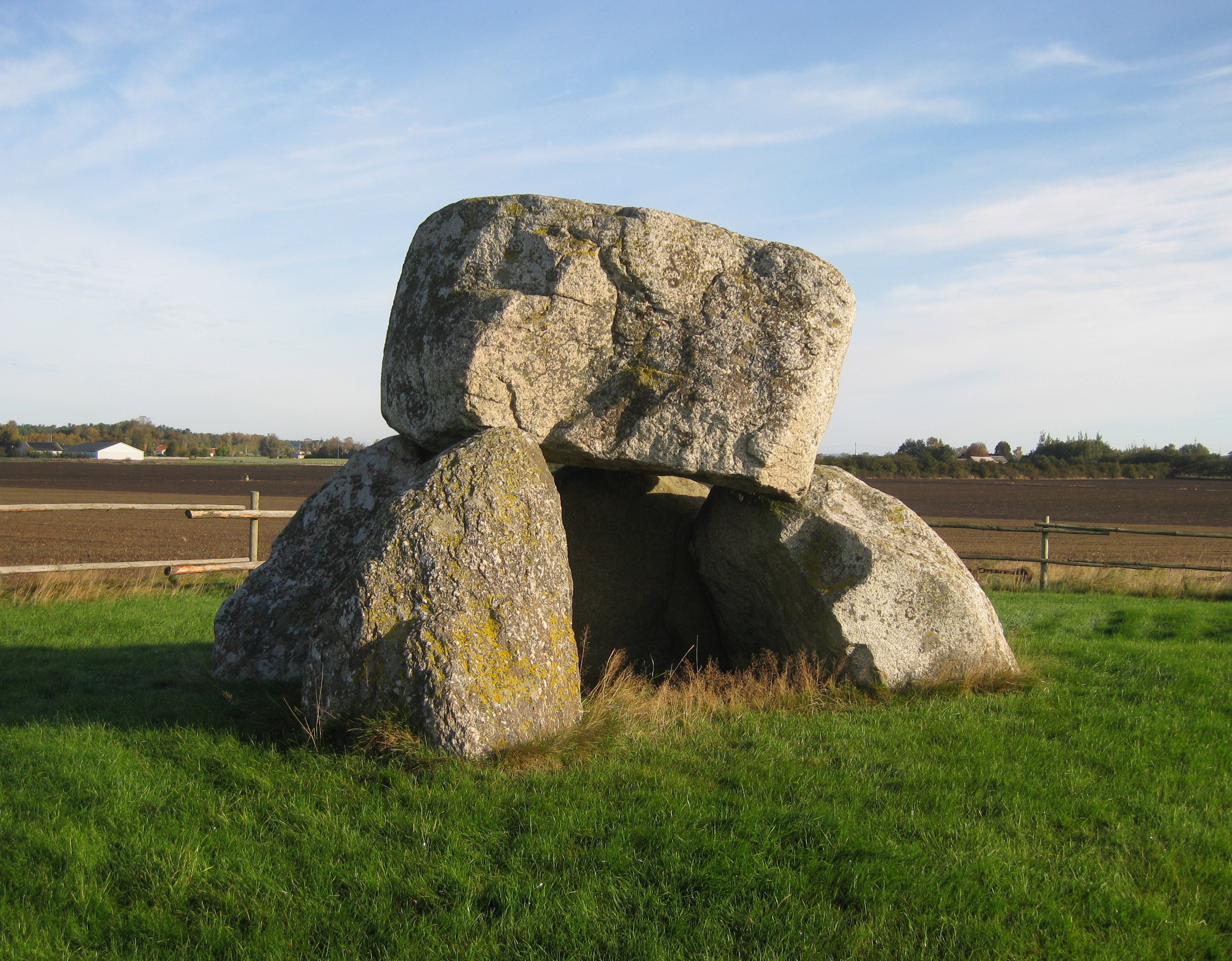 Hofterupsdösen, megalitgrav i Kävlinge kommun